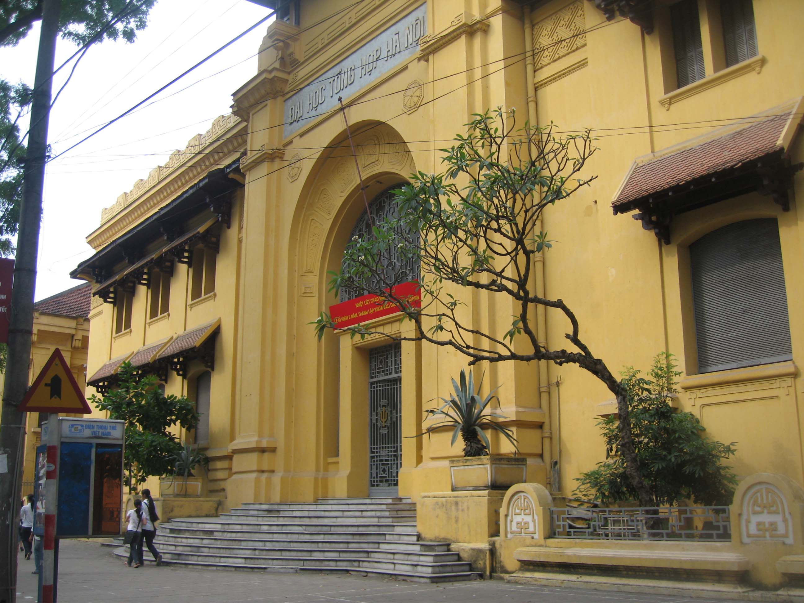 Thể loại:Trường đại học tại Hà Nội